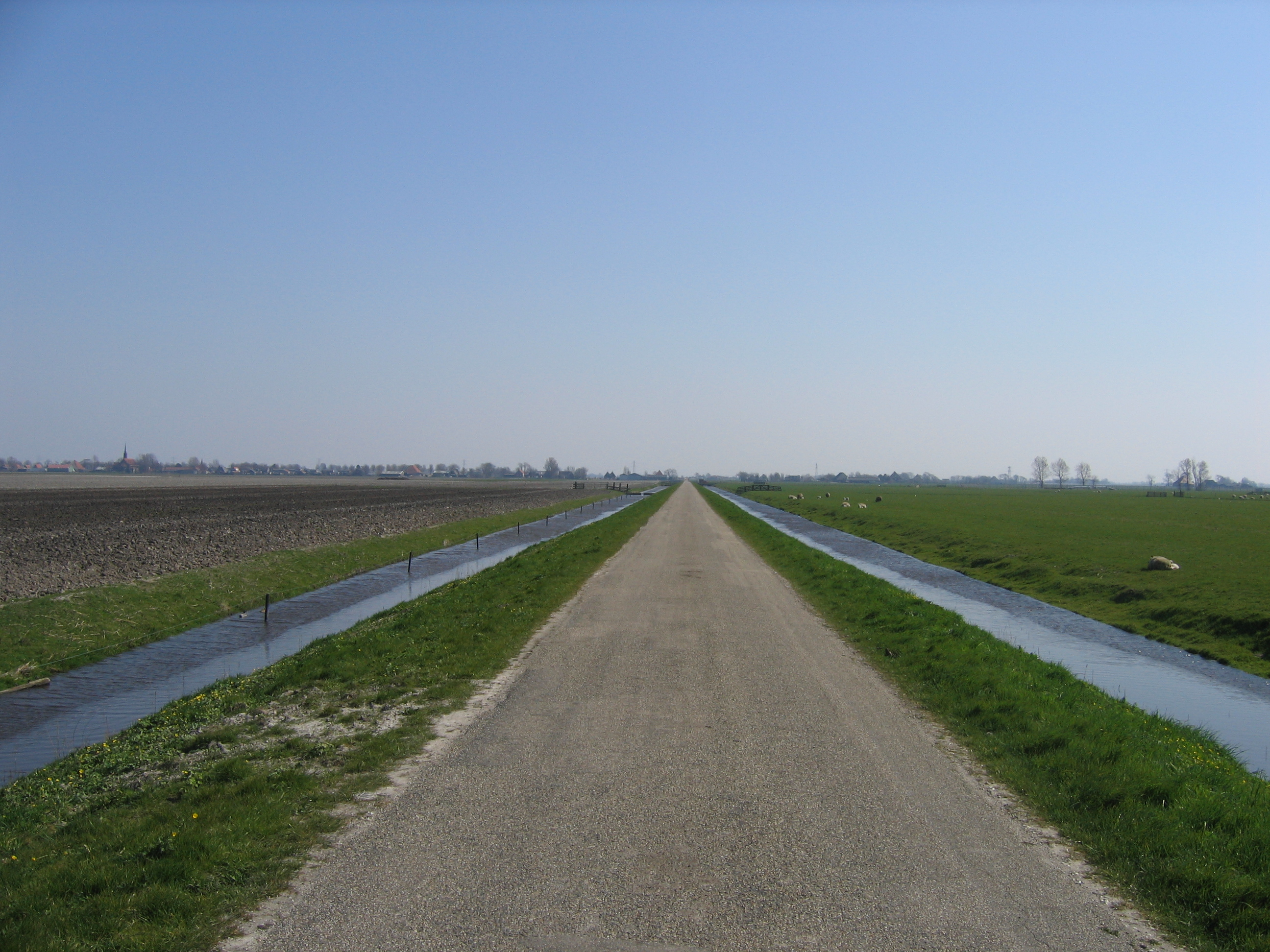 Bloemendalerweg in oostelijke richting, in de buurt van Zuidschermer, bij het Noord-Hollands kanaal.